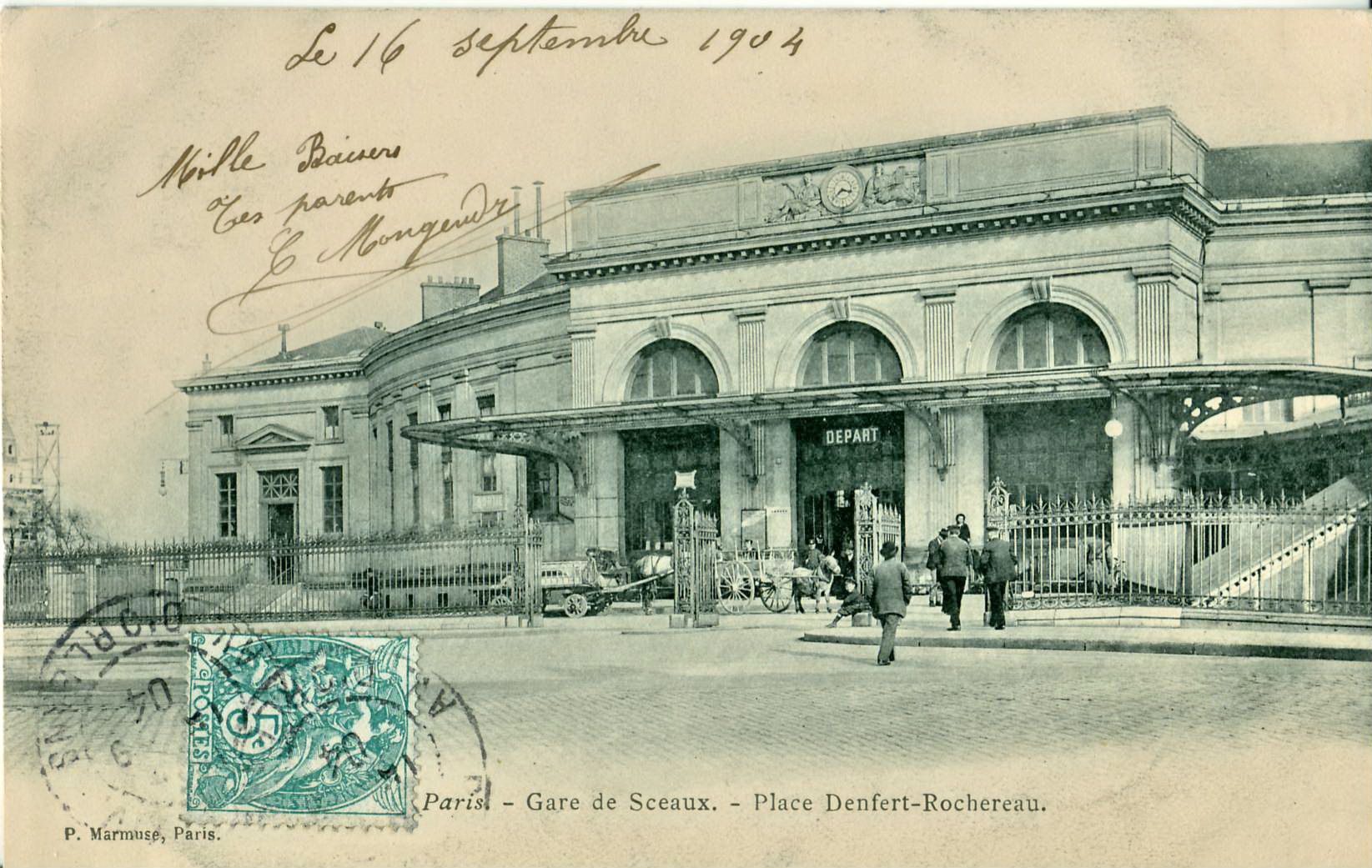 Carte postale ancienne éditée par Marmuse Paris : Gare de Sceaux - Place Denfert Rochereau